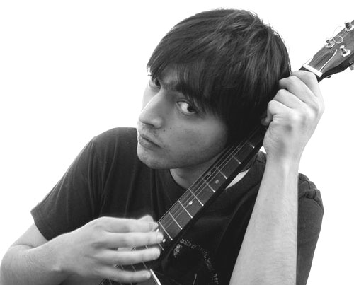 Autorretrato Julián Méndez